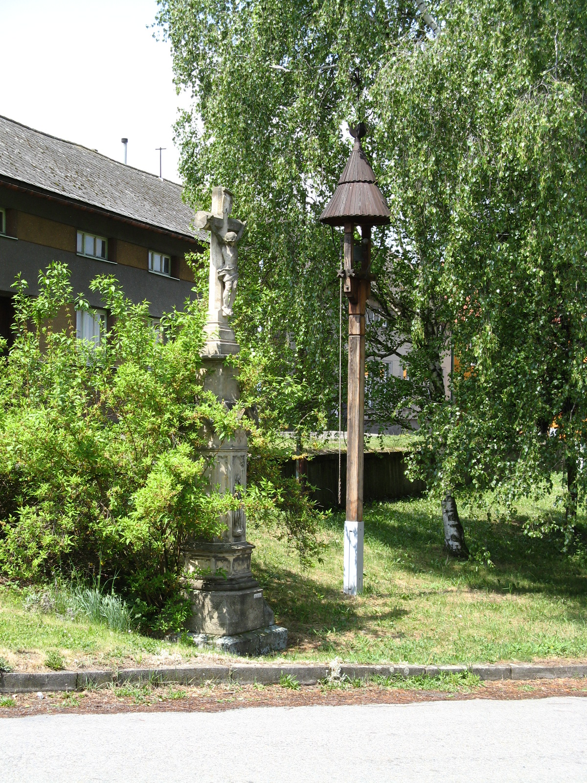 Zvonička (Srbce), náves, Srbce